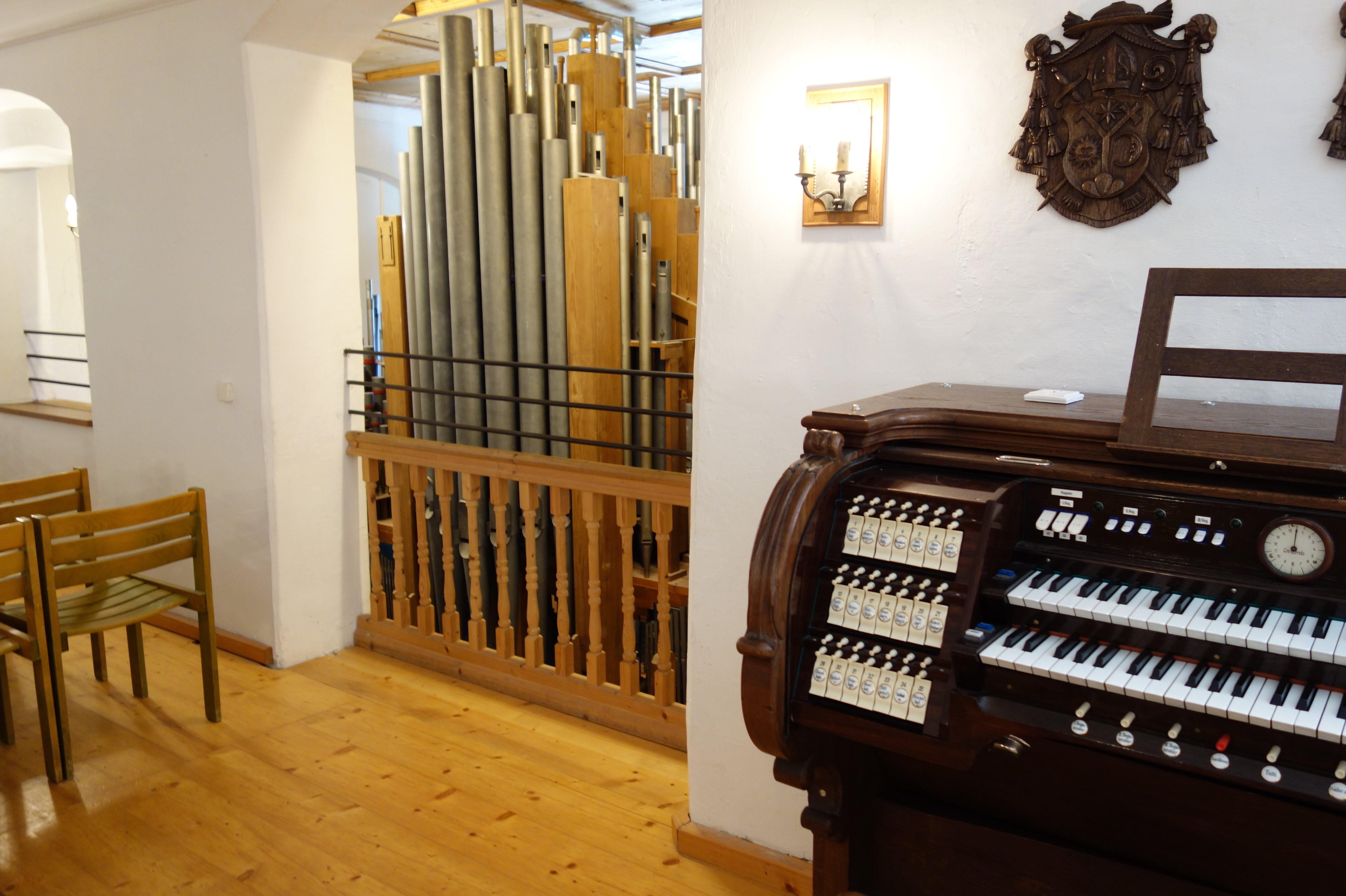 Die Moser-Orgel aus Gößweinstein im Orgelzentrum Valley (1939, Albert Moser, II/42)